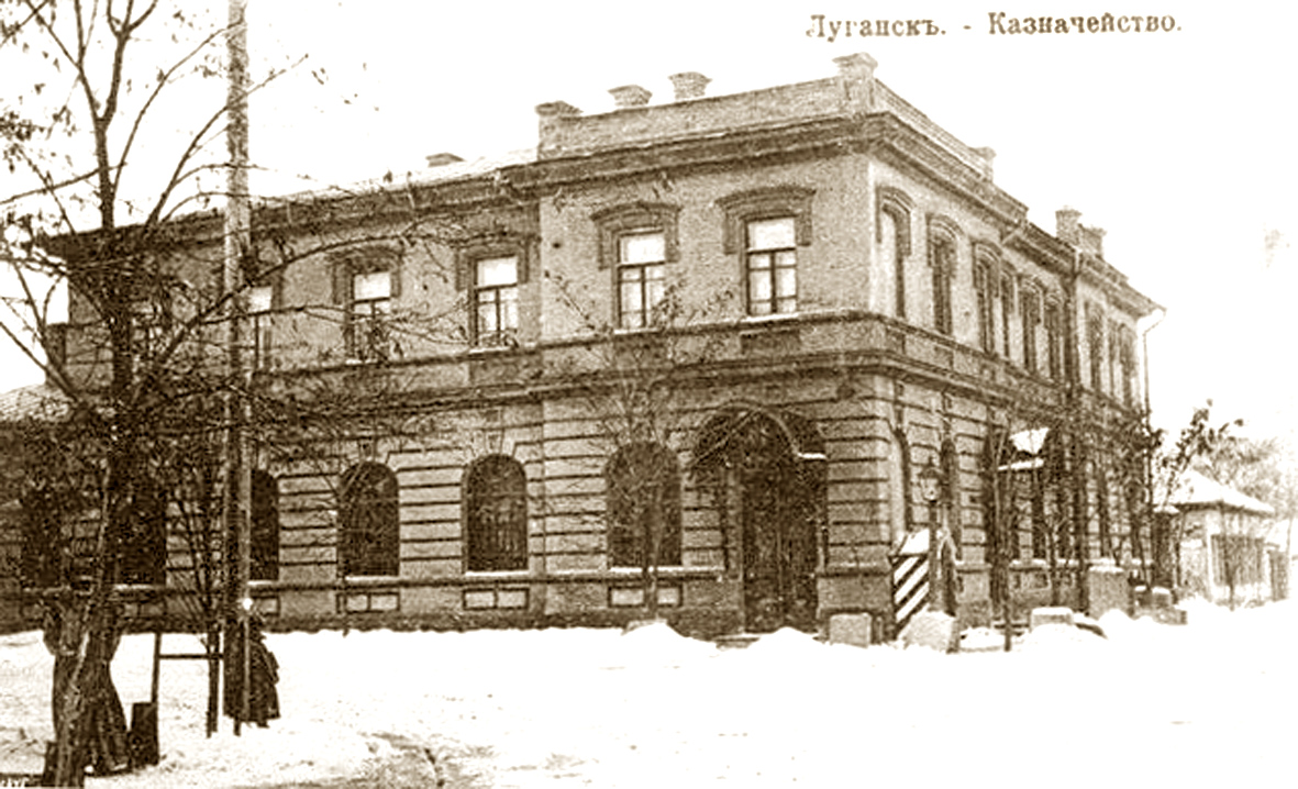 Казначейство на ул. Даля